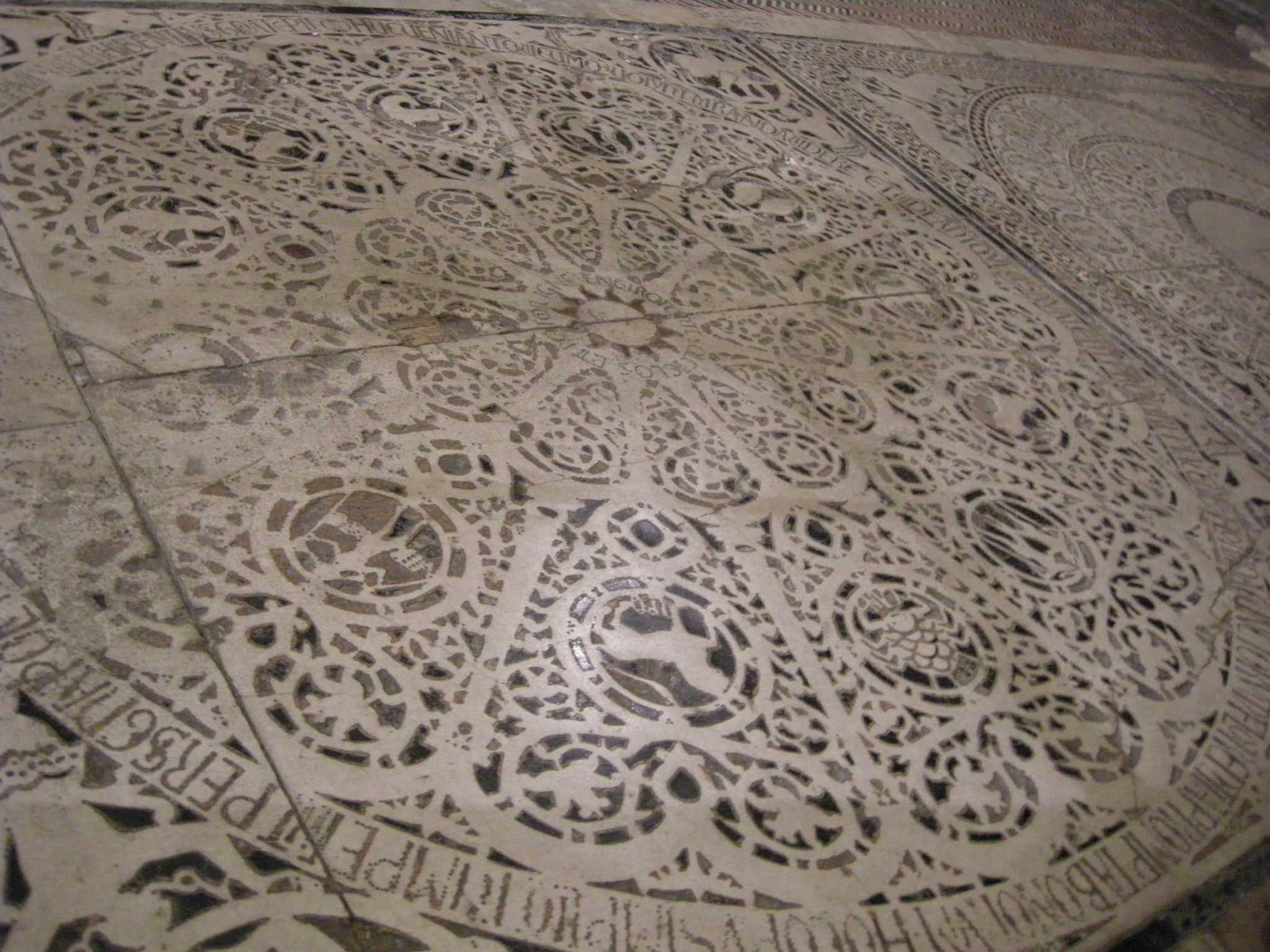 Battistero di firenze, pavimento, rosone dello zodiaco 02